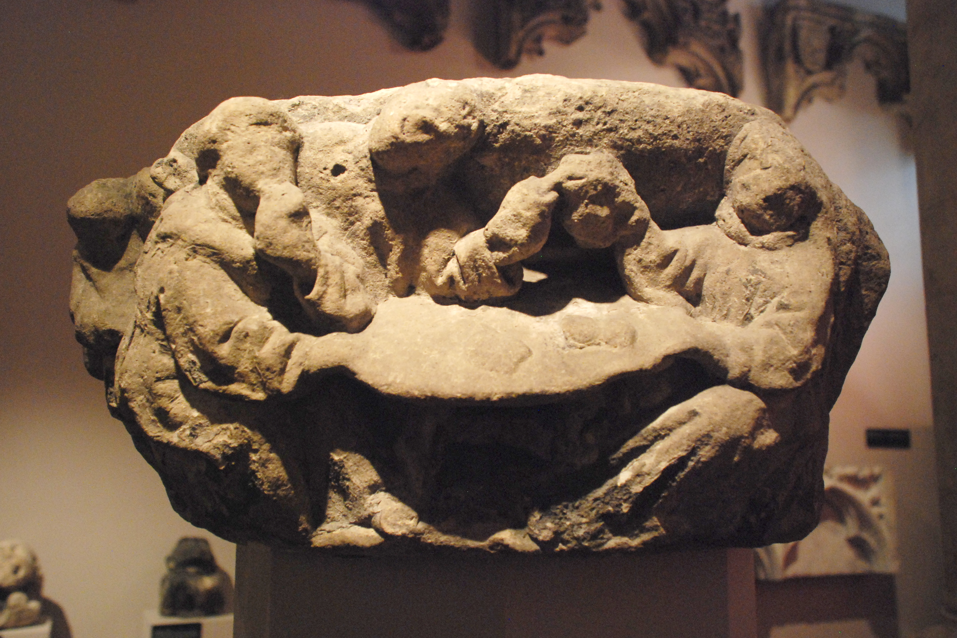 Belgique - Bruxelles - Hôtel de Ville - original du chapiteau de la Maison de la Cave aux Moines ('s Papenkeldere) intégrée à l'Hôtel de Ville (chapiteau conservé au Musée communal, dans la Maison du Roi)